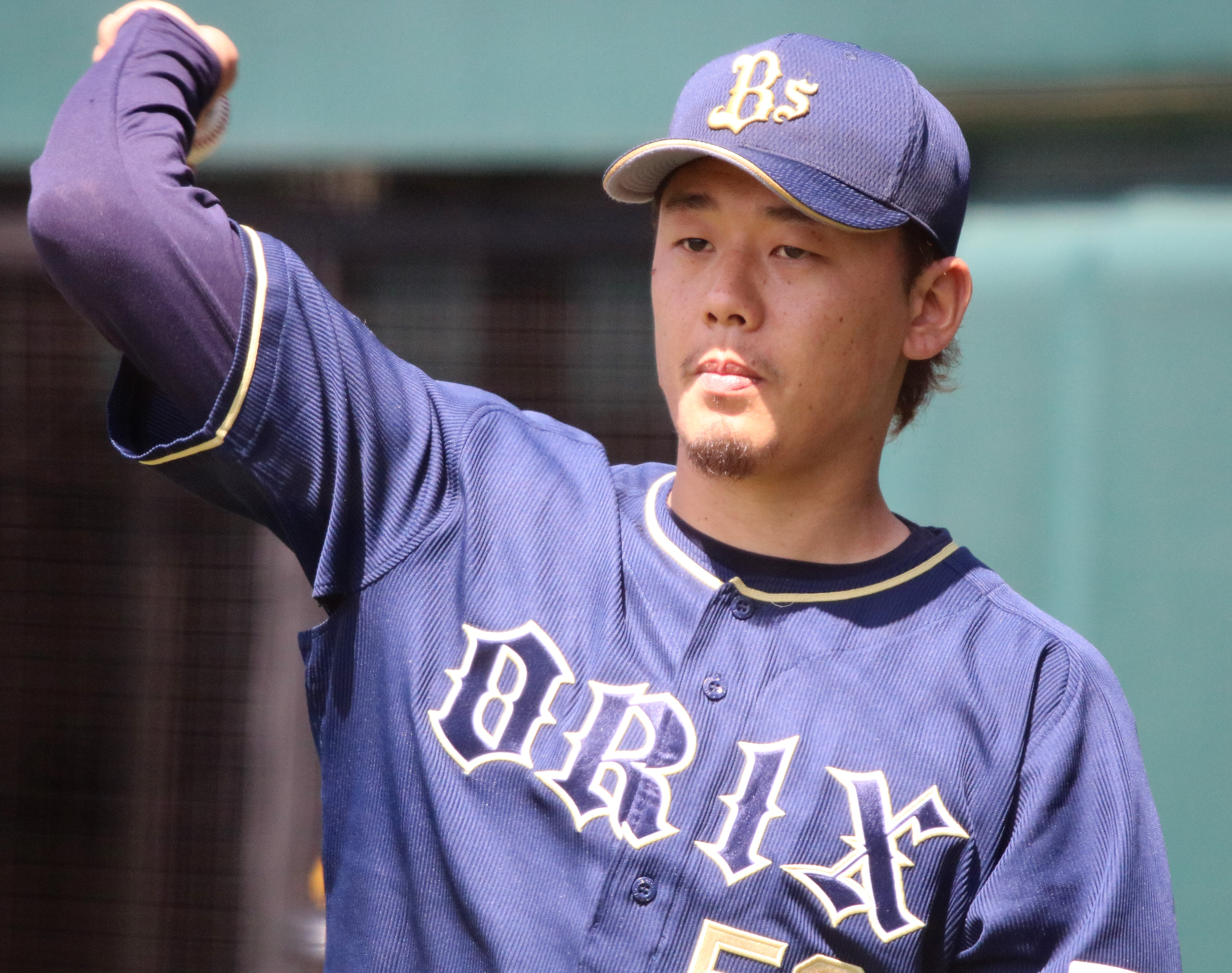 2018/4/20 タマホームスタジアム筑後